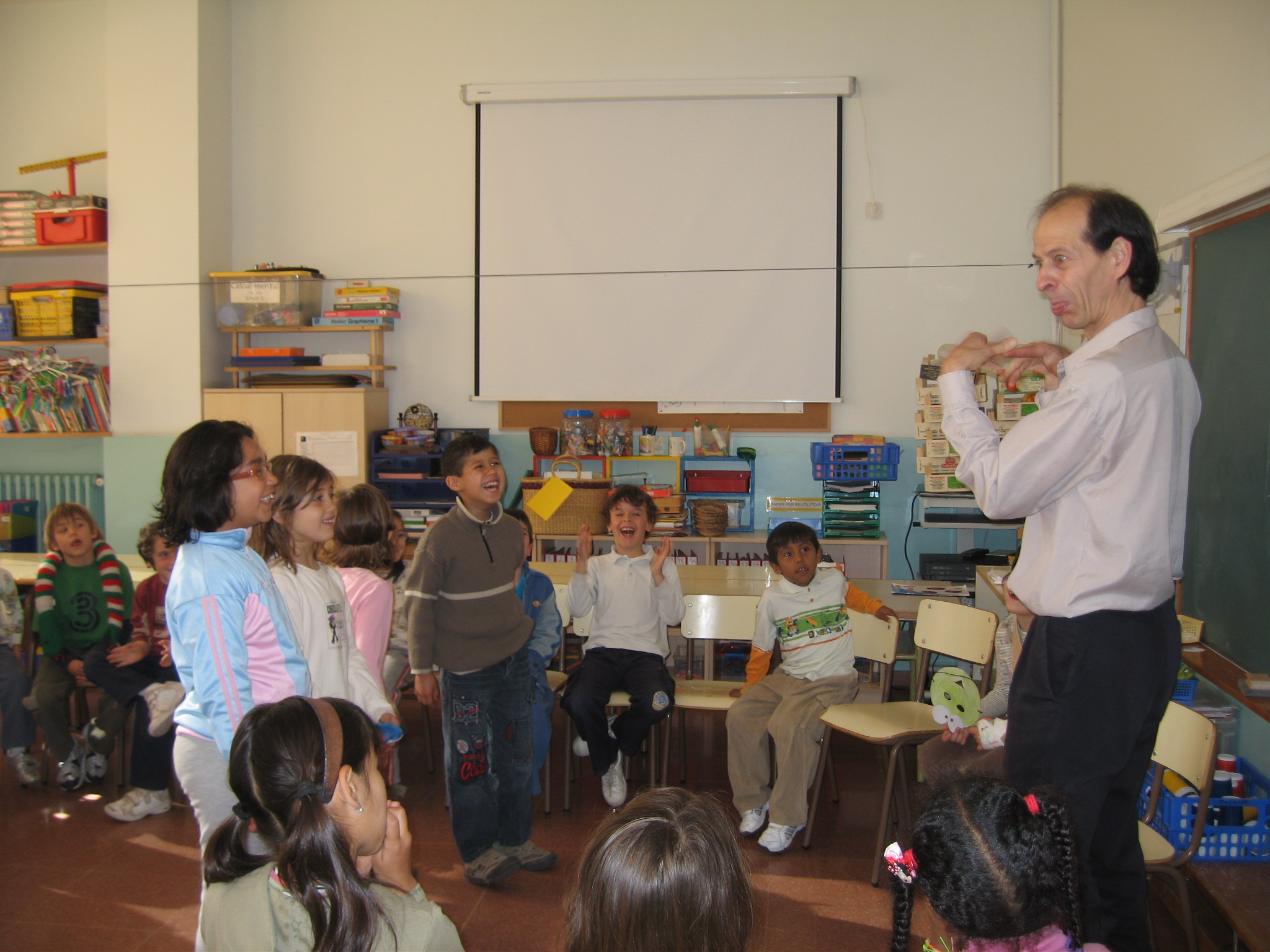 En Ricard Bonmatí a l'escola Arc Iris de Barcelona